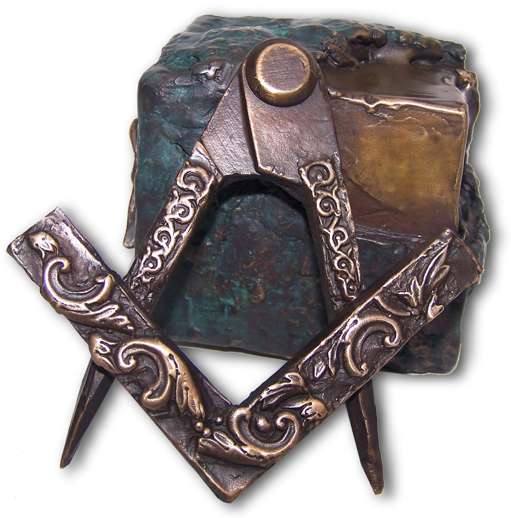 Bronzeplastik "Erster Grad"